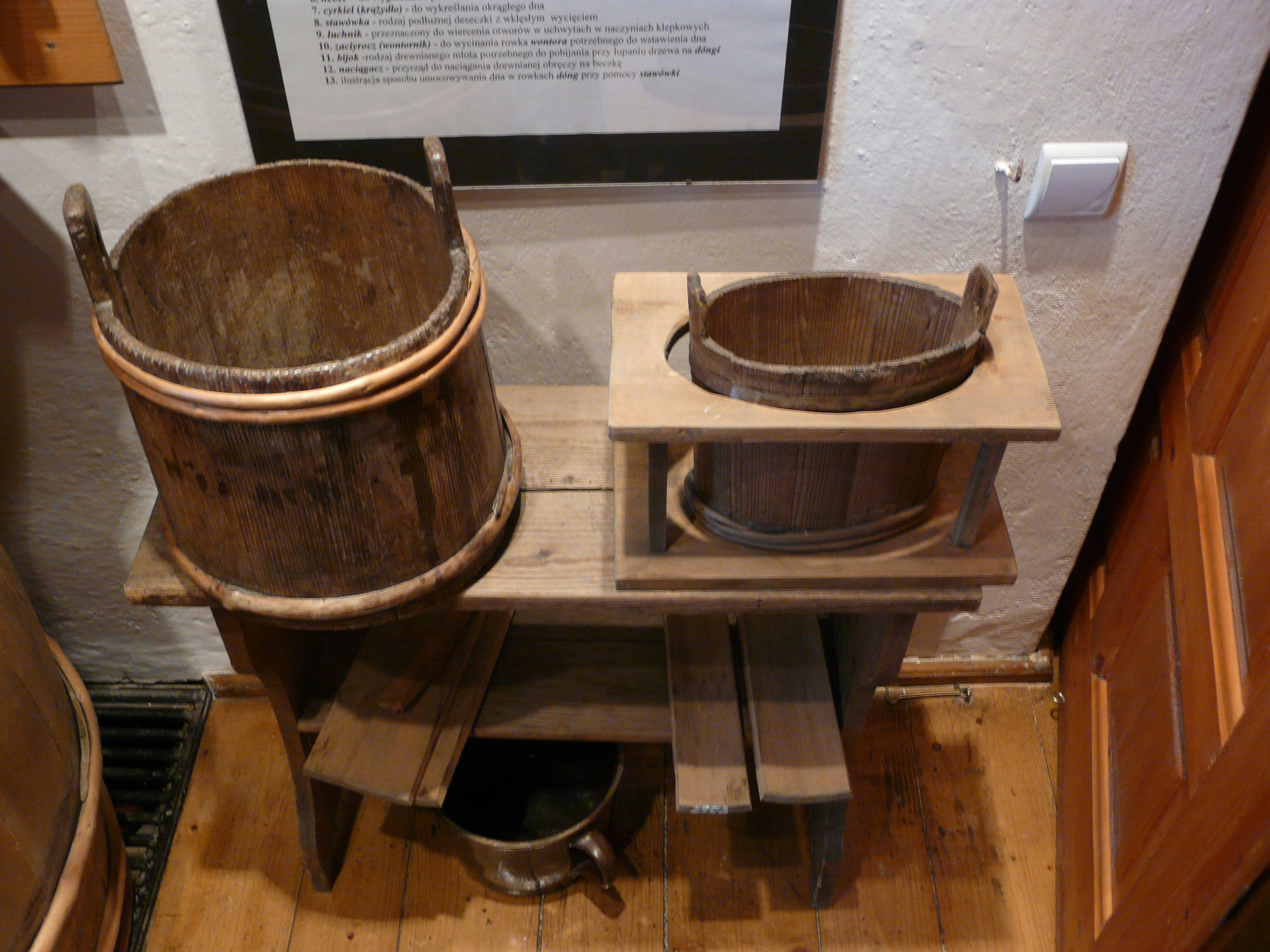 Beskid Museum in Wisła / wooden tub / Holzbottich